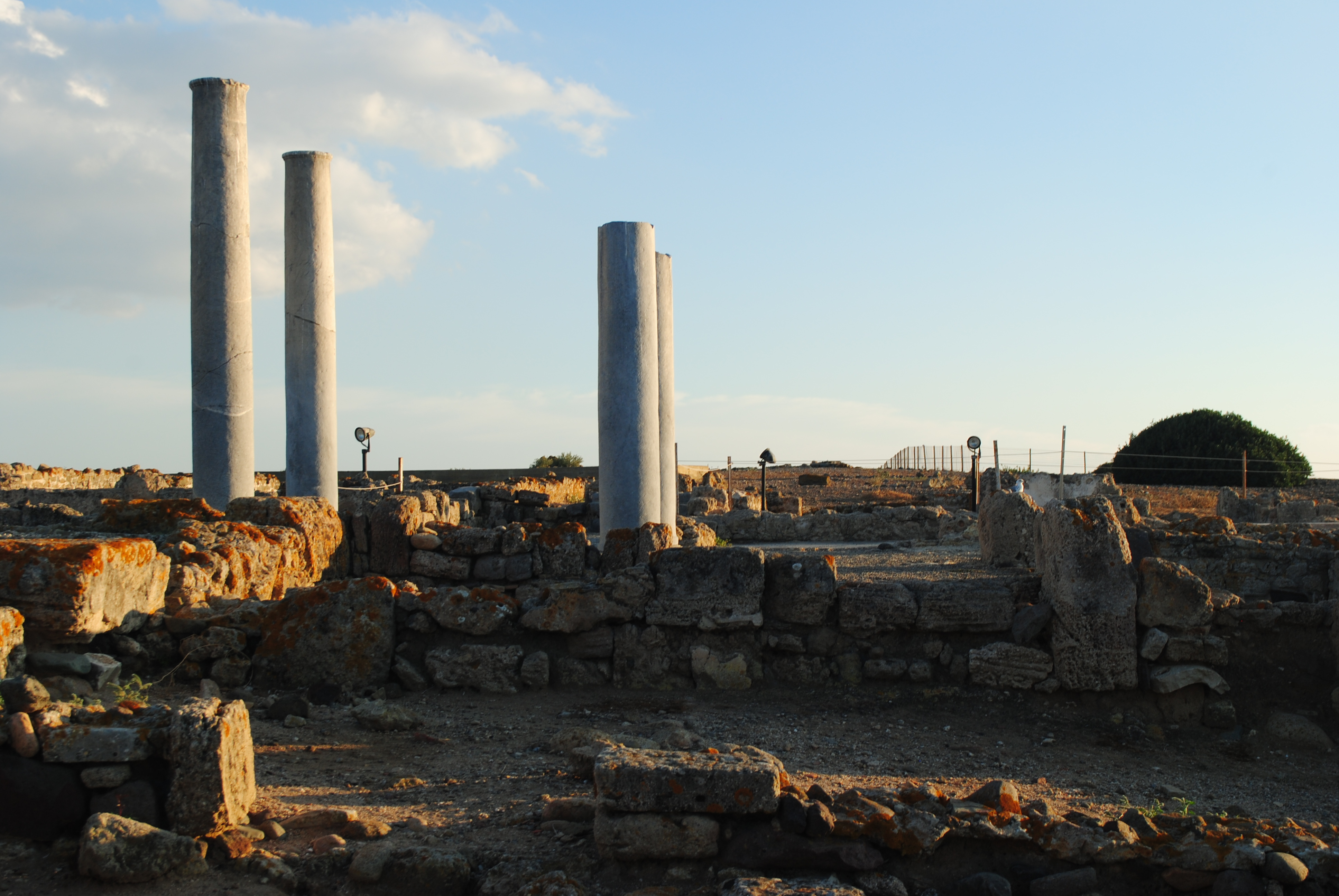 Area archeologica di Nora - MIBAC This is a photo of a monument which is part of cultural heritage of Italy.